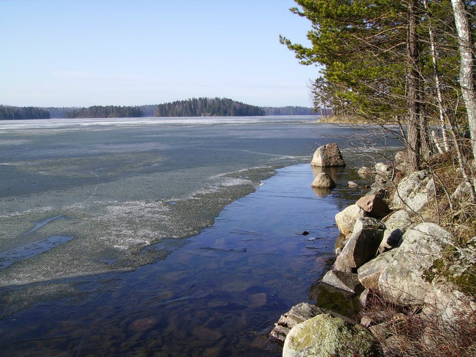 Heponiemi sijaitsee Puujärven rannalla